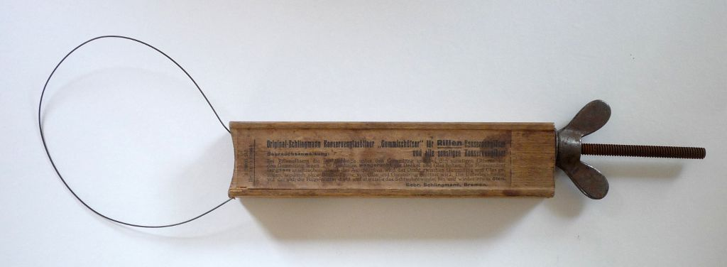 Öffner für Weckgläser (Einmachgläser), um 1919 Die Aufschrift lautet:Original-Schlingmann Konservenglasöffner "Gummischützer" für Rillen-Konservengläser und alle sonstigen KonservengläserGebrauchsanweisung: Bei Rillengläsern die Drahtschlinge unter den Gummiring und bei sonstigen Gläsern auf den Gummiring legen. Die Flügelmutter langsam anschrauben. Durch das Anschrauben wird der Draht zwischen Gummiring und Glas gezogen, wordurch ohne Beschädigung von Glas und Gummiring geöffnet wird. Die Unterlegscheibe, vor der sich die Flügelmutter dreht und ebenfalls das Schraubgewinde, hin und wieder etwas ölen.Gebr. Schlingmann, Bremen.